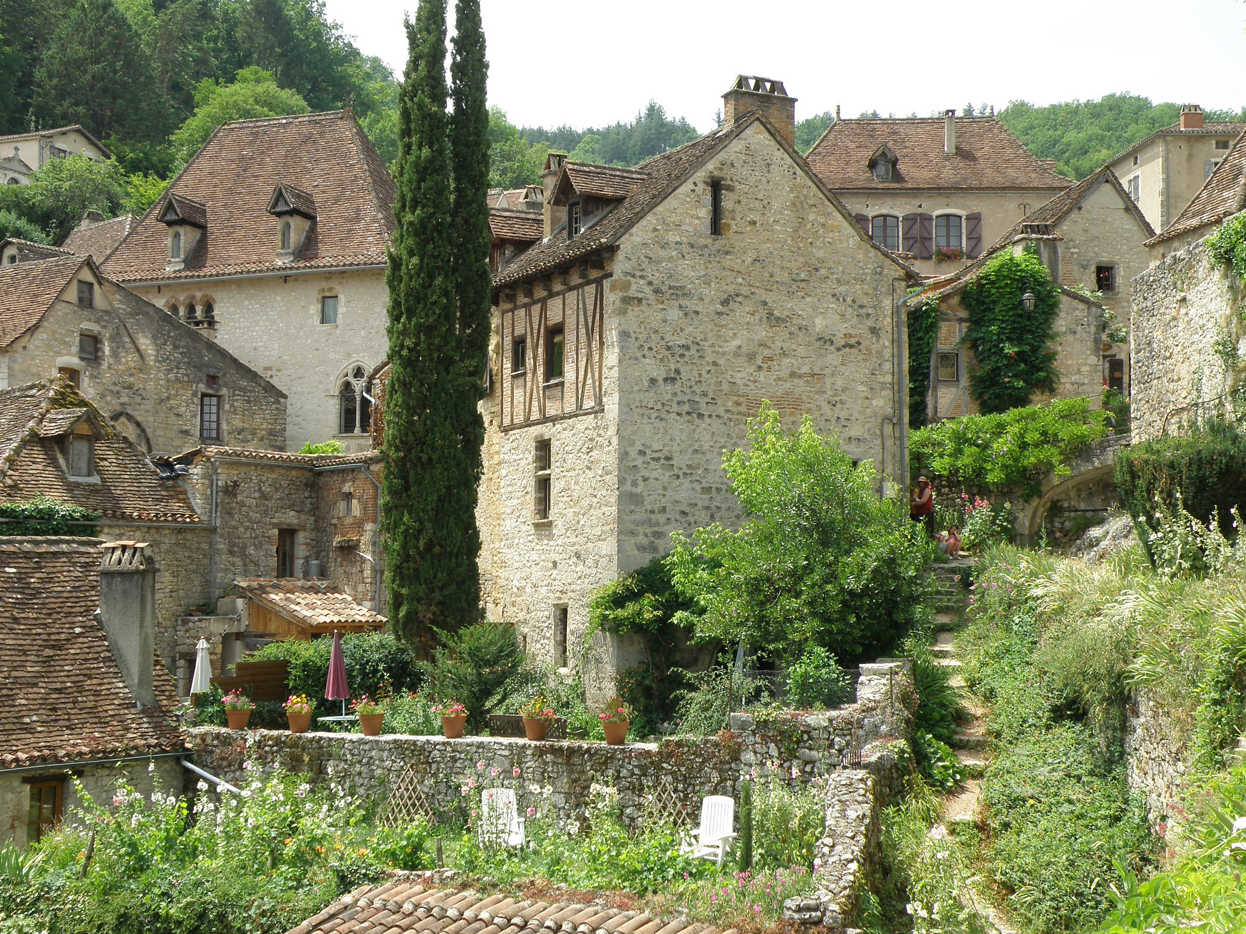 Saint-Cirq-Lapopie (Lot, France). Aspect du bourg. La maison Daura est visible à gauche.